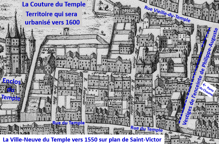 Villeneuve du Temple vers 1550